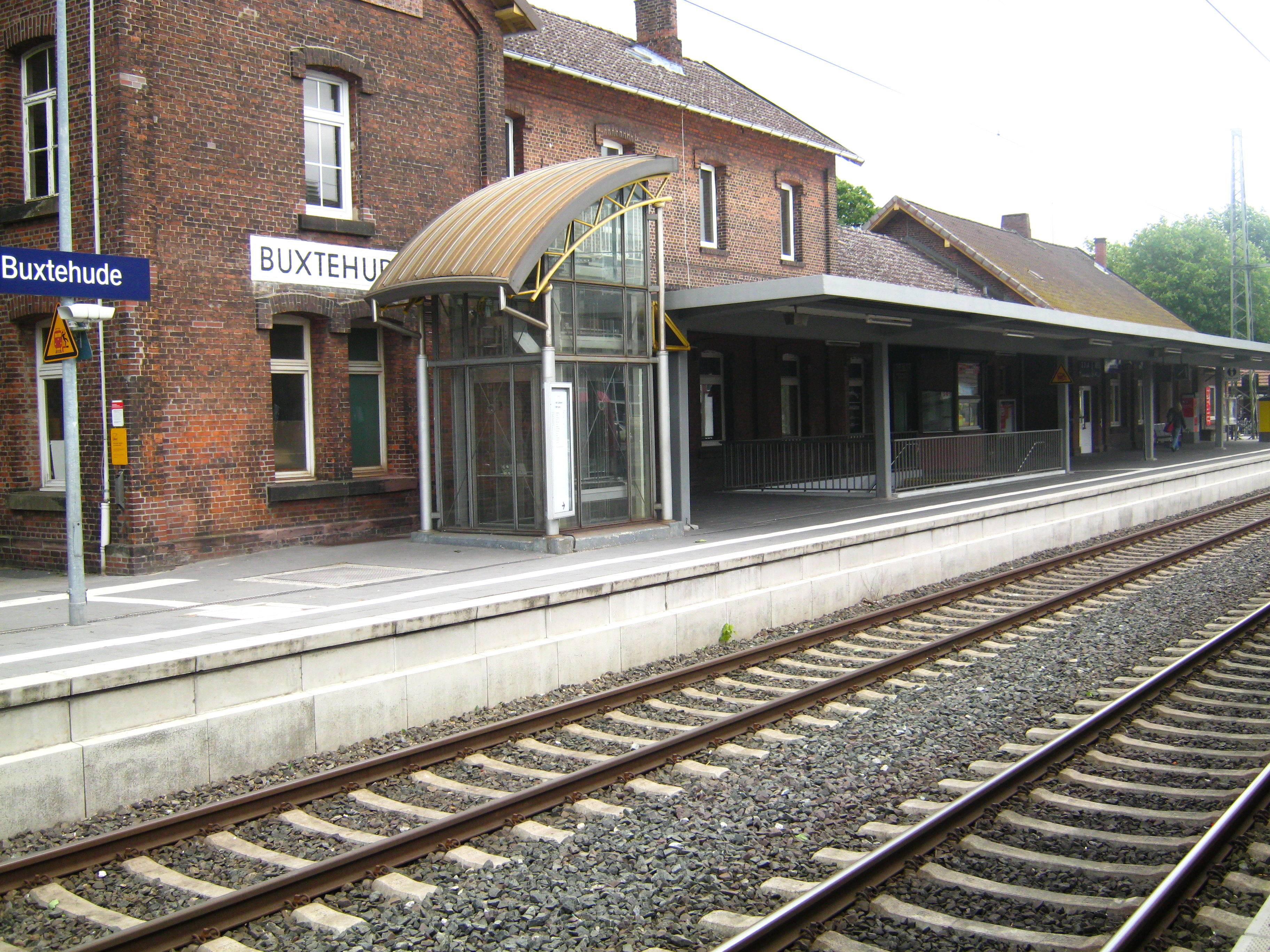 S-Bahn-Station Buxtehude.